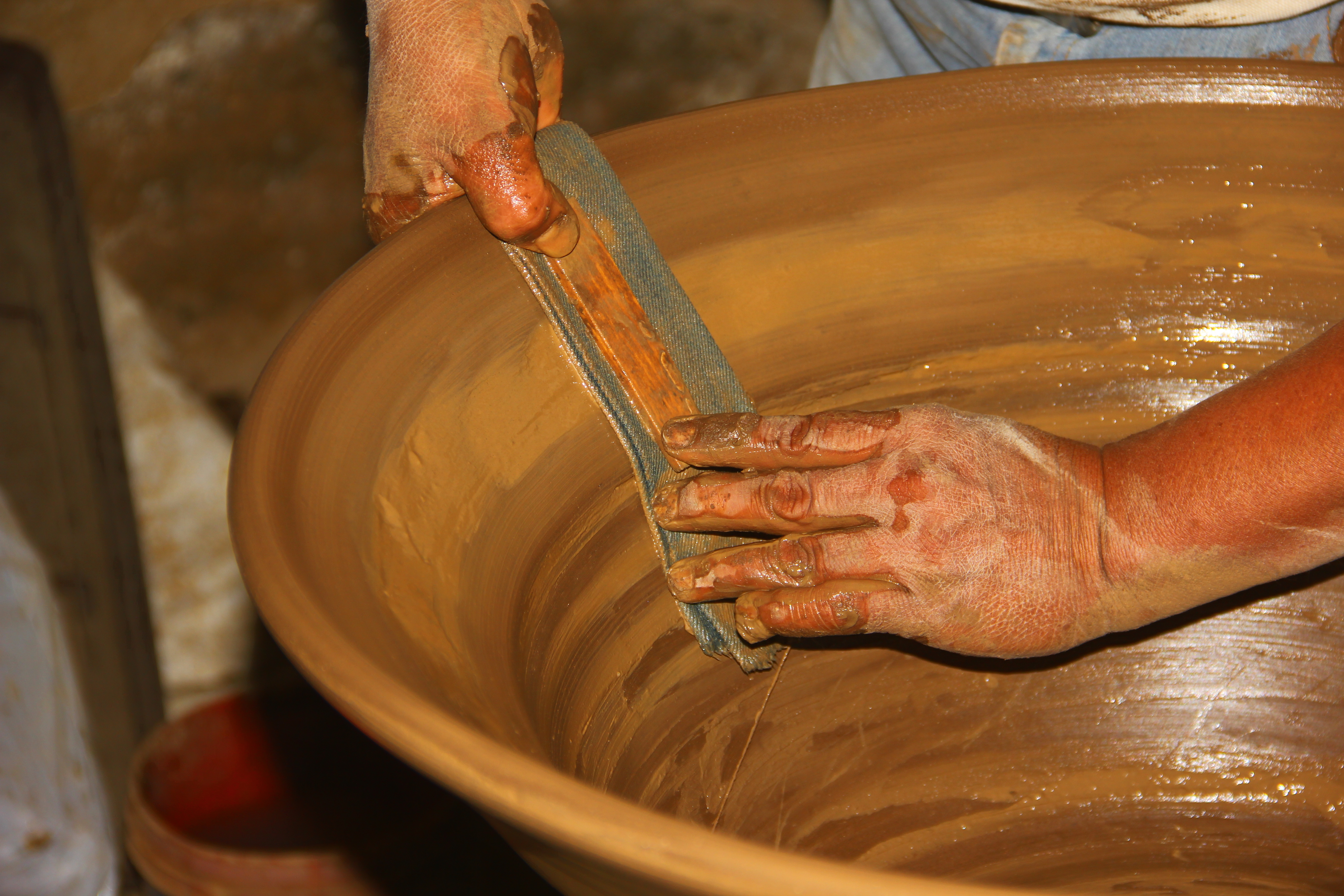 con una madera y una mezclilla el artesano se ayuda para pulir y alizar una cazuela